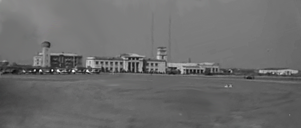 Броварський аеродром, 1940 рік. Cтоп кадр фільму «Будні» («Мосфильм" и «Советская Беларусь», 1940 р.).